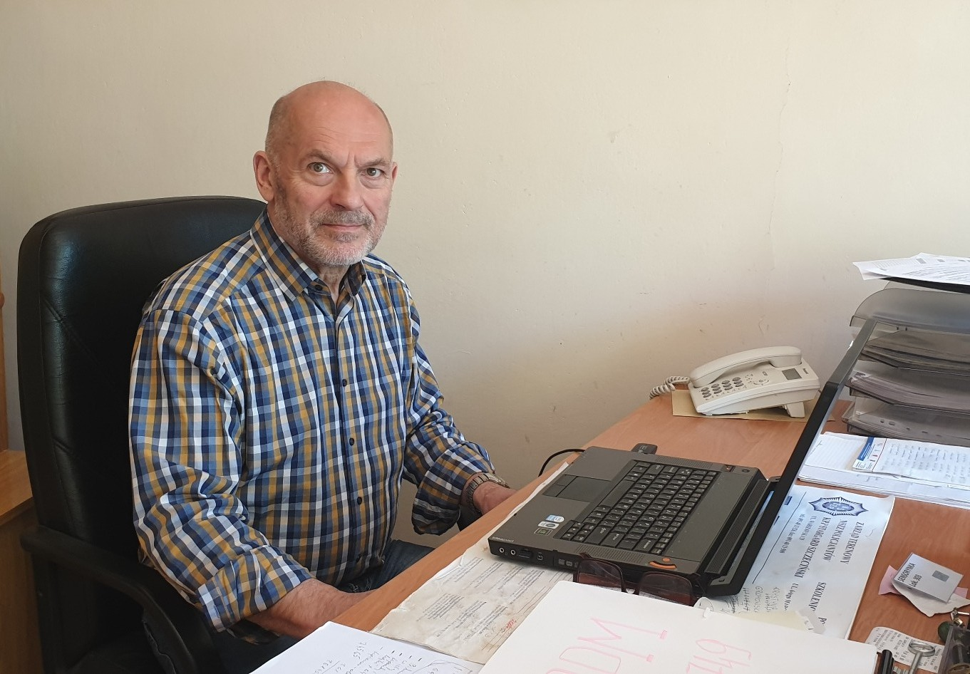 Klub Wojskowy. Kierownik Augustyn Maćkowiak